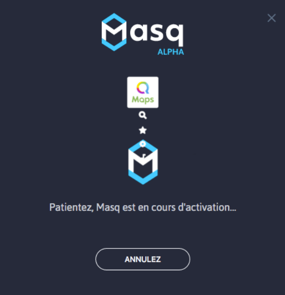 Page de chargement de la synchronisation entre Masq et Qwant Maps